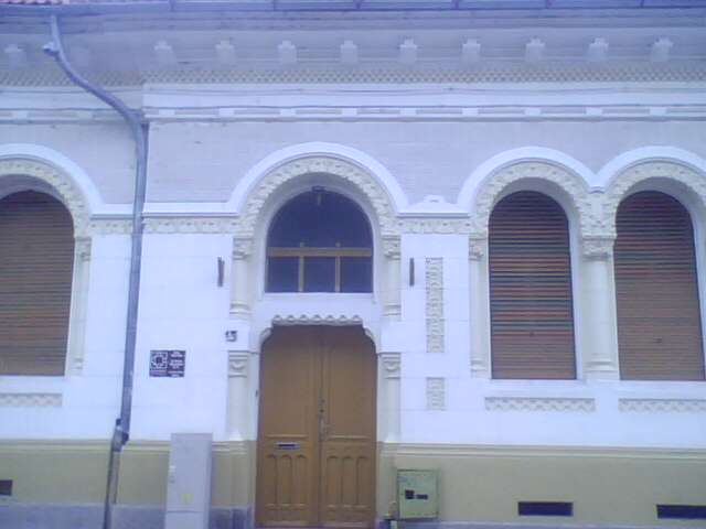 CASA in ARAD.